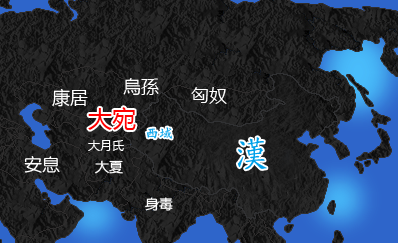 大宛方位